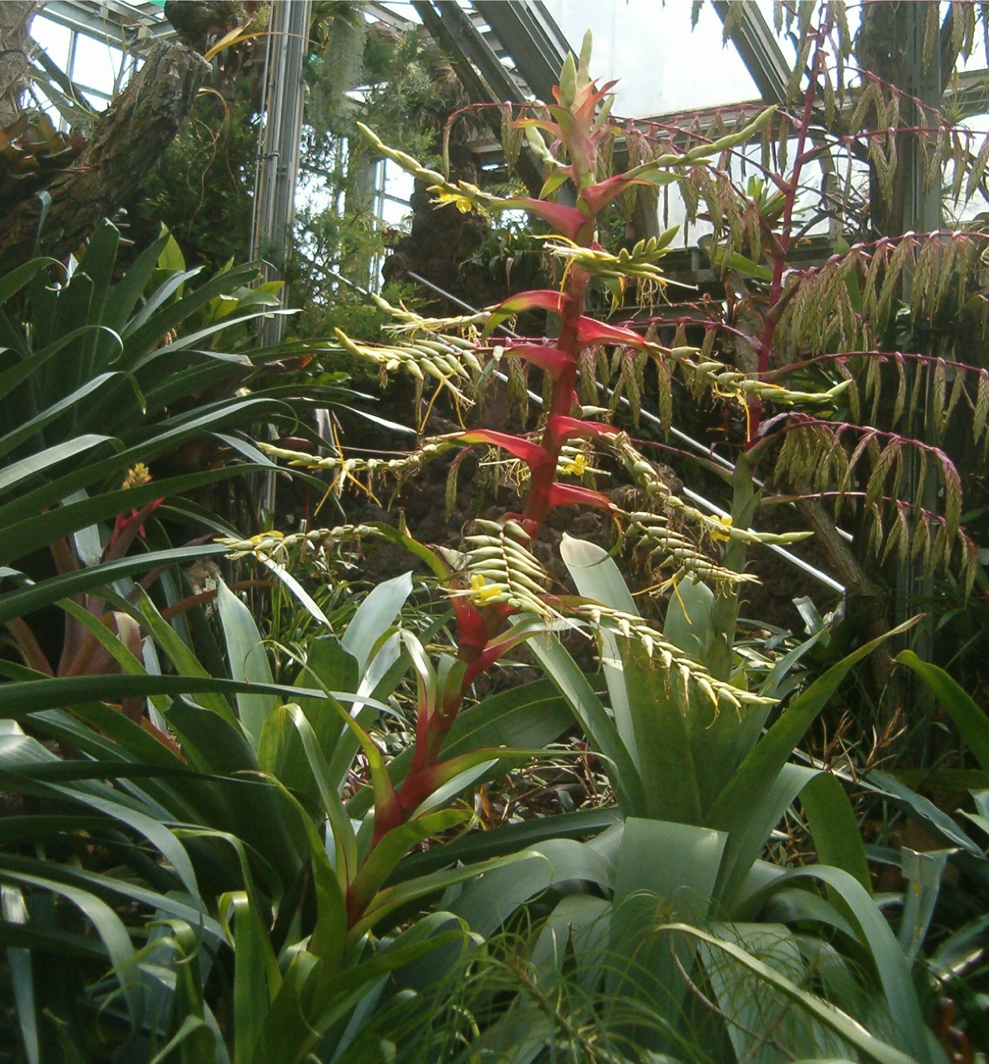 At Botanical Gardens Berlin-Dahlem Species Alcantarea geniculata